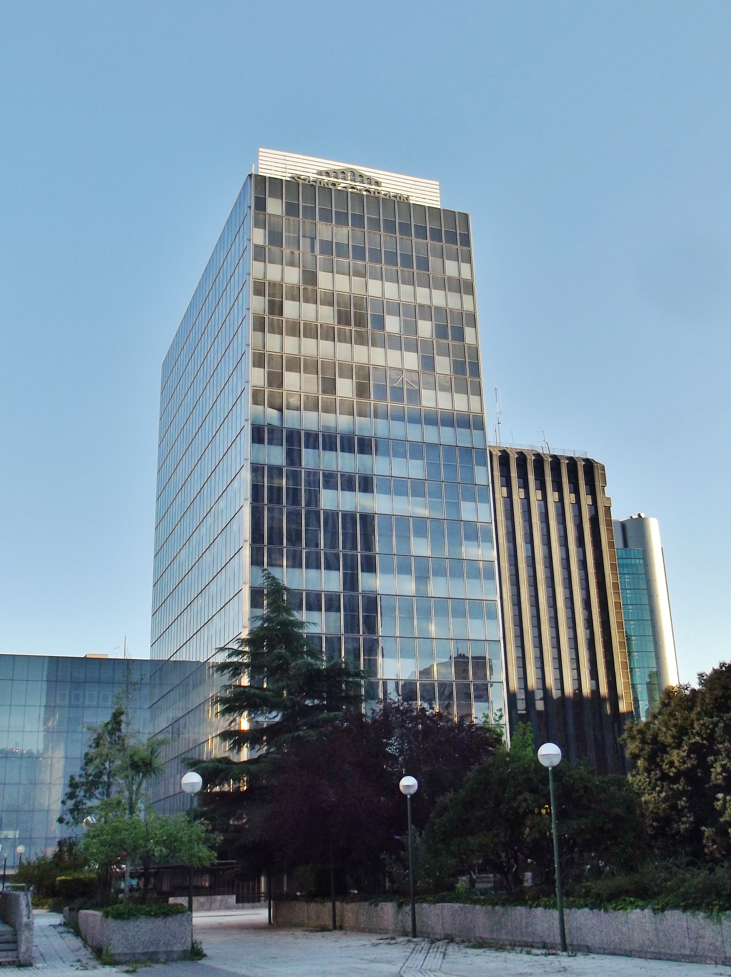 Edificio Cristalera Española, en el número 77 del Paseo de la Castellana, Madrid. Arquitecto: Manuel Aymerich Amadiós. Online database: COAM.